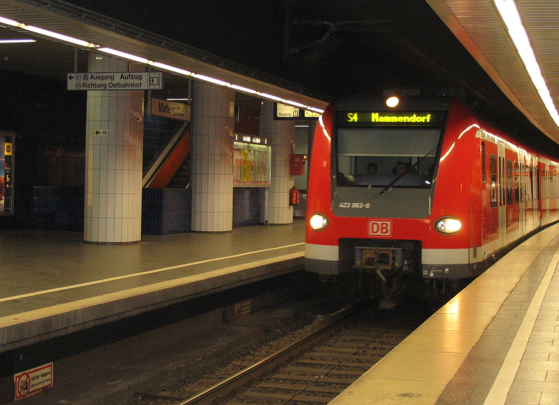 Informationen Beschreibung: Ein Zug der Linie S4 in Richtung Mammendorf im S-Bahnhof Marienplatz Autor: Jcg2006 Aufnahmedatum: 16. Mai 2006 Quelle: selbst fotografiert